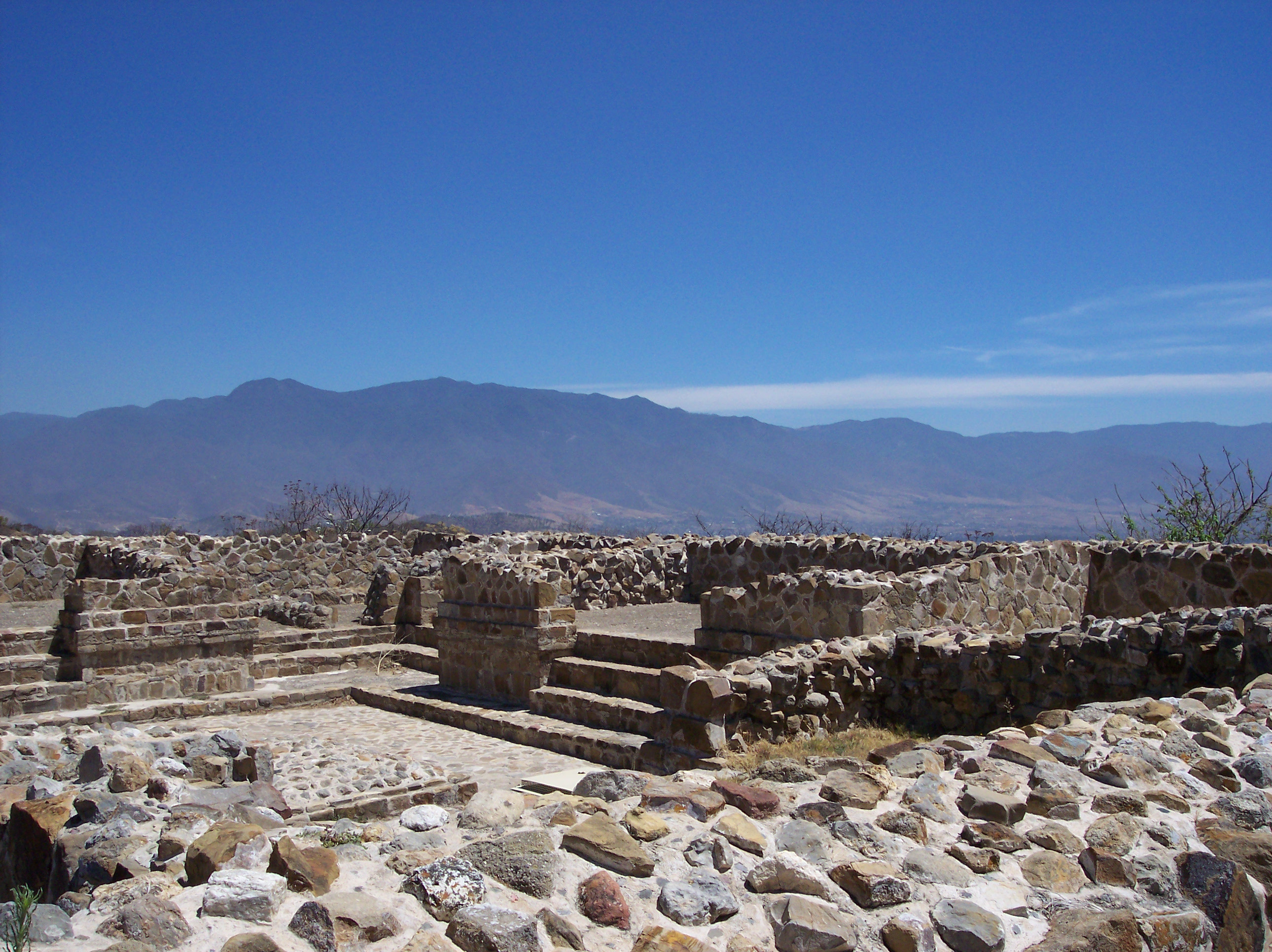 Photo taken in Monte Alban, State of Oaxaca, Mexico. NOTE: Photo nead to be describe. SPANISH: Foto tomada en Monte Albán, Estado de Oaxaca, México.